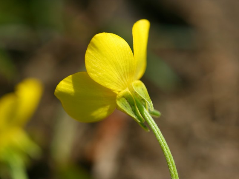 Rauher Hehnenfuß (Ranunculus sardous), Detail der Blüte